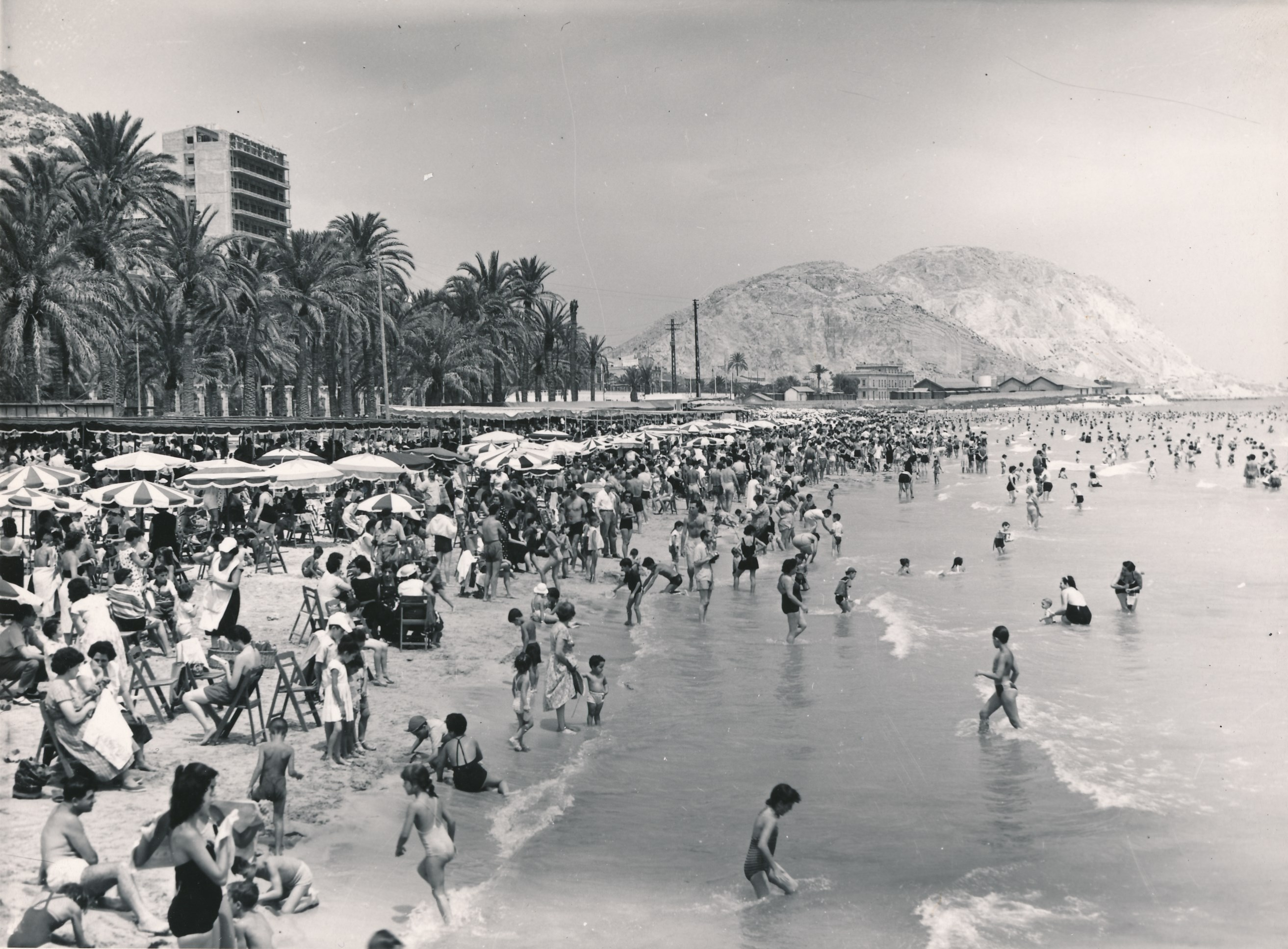 Alicante, 1957 Procedencia: Desconocido Fotógrafo: Roberto Arranz Registro nº: 00744 Signatura: Caja 8 Fondos: Biblioteca de la Facultad de Empresa y Gestión Pública (Universidad de Zaragoza) Legado: Luis Fernández Fuster / E.S. Turismo Huesca